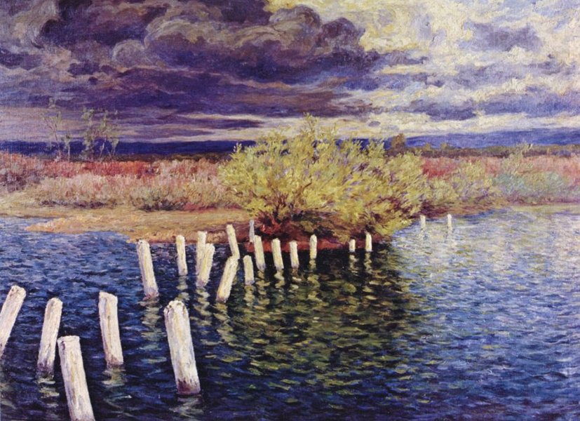 Пейзаж